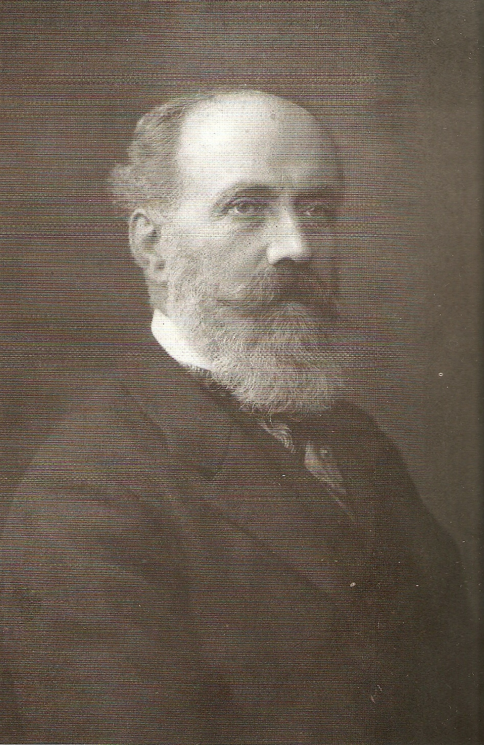 Książę Hugo von Radolin